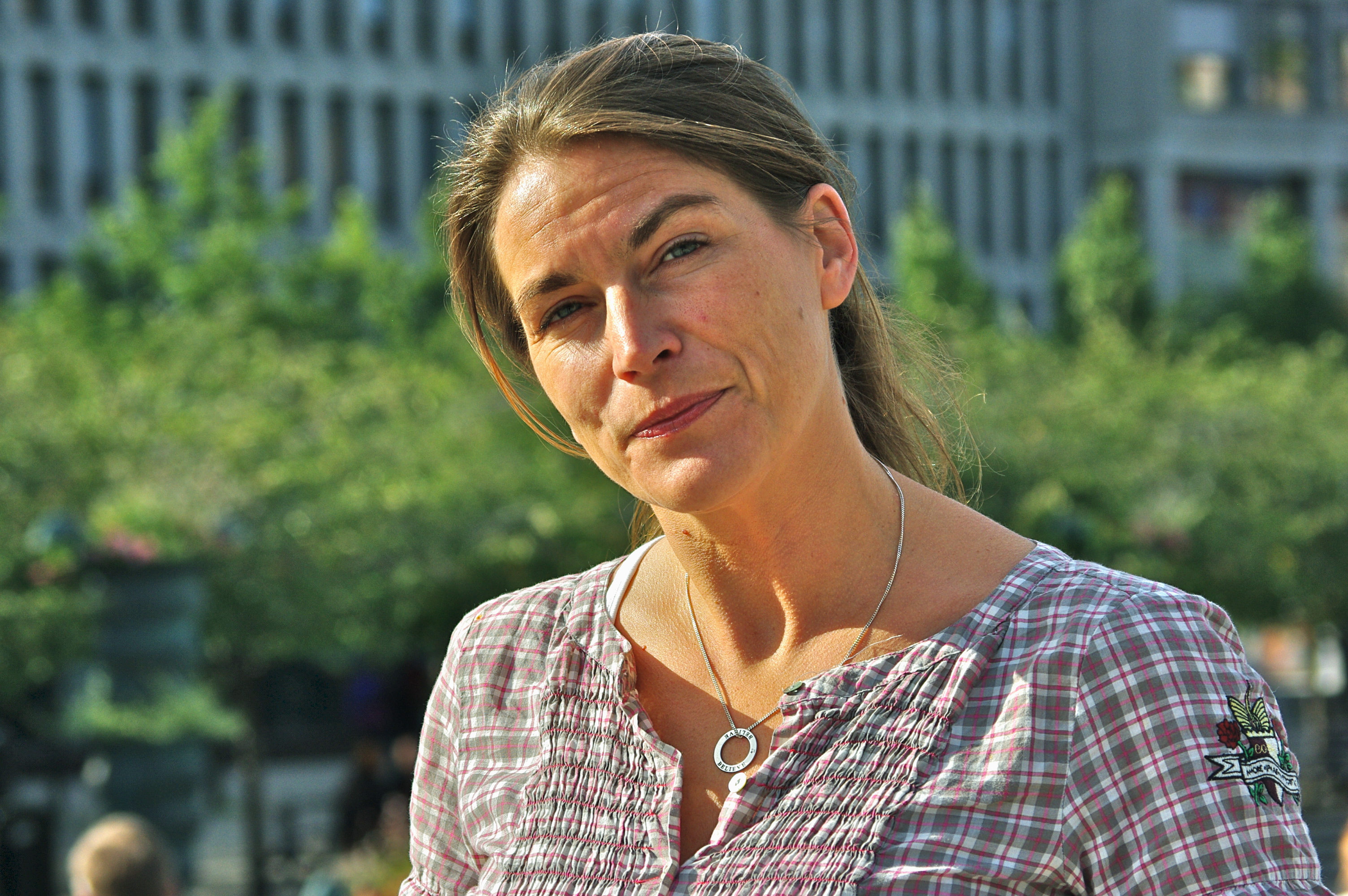 Sofia Mirjamsdotter